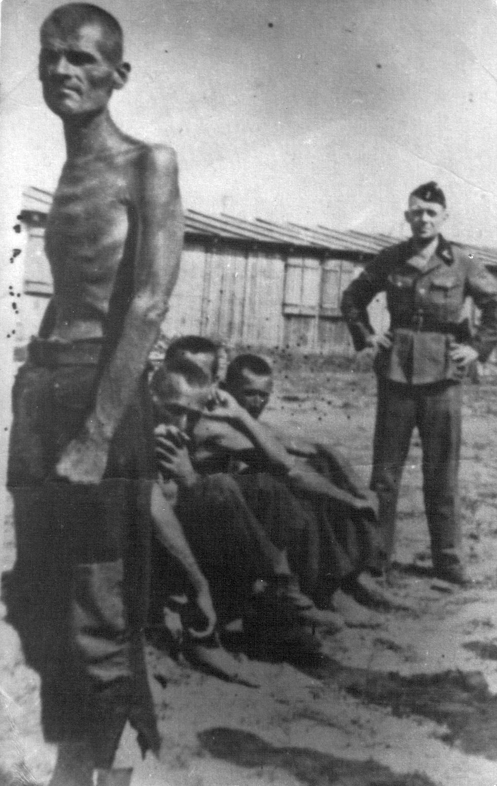 Srpskohrvatski / српскохрватски: Zarobljeni partizani u logoru Sajmište. Braća Jovanovići iz Kadine luke (Ljig, Valjevo). Dopremljeni su u logor Sajmište 19. maja a odvedeni za Austriju 29. maja 1942. godine.